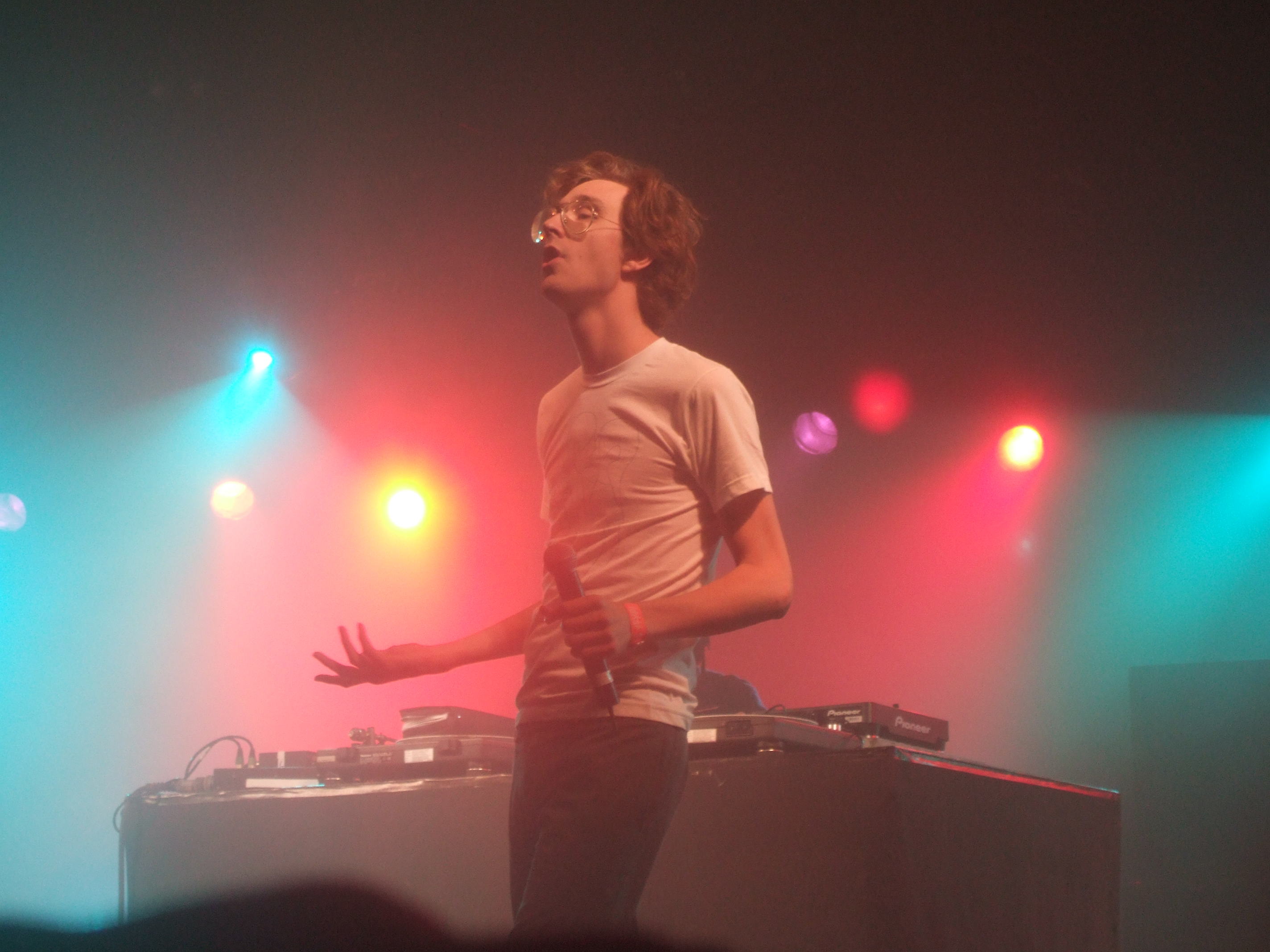 Erlend Øye